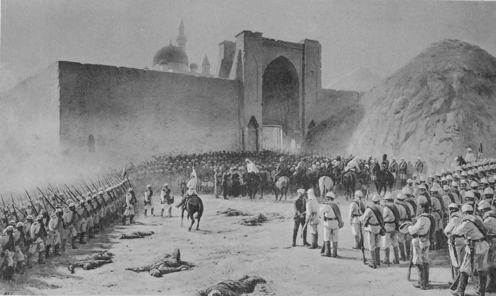 Освобождение гарнизона Баязетской цитадели в 1877 году, 1885. Центральный военно-исторический музей артиллерии, инженерных войск и войск связи, Санкт-Петербург, Россия